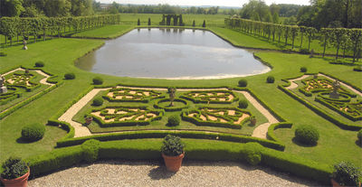 Garden borders